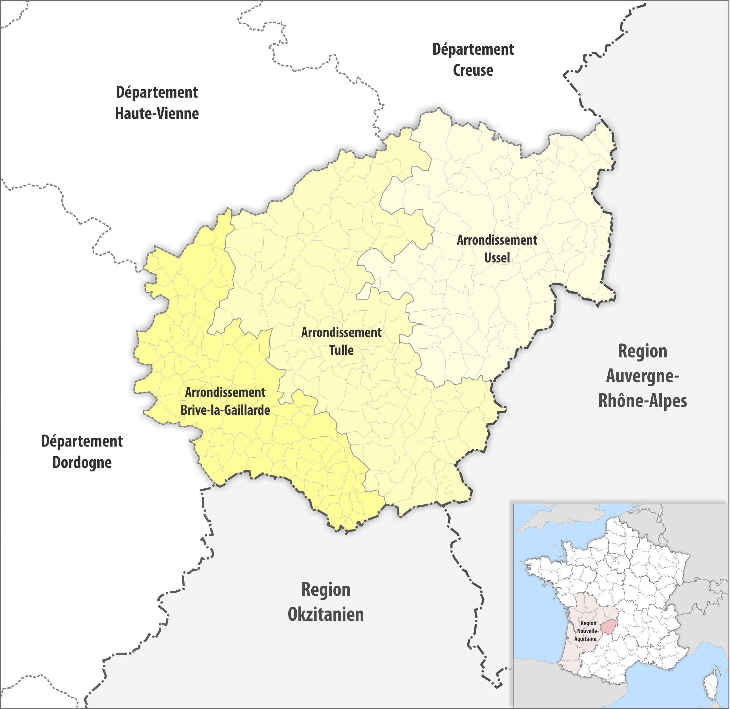 Gemeinden und Arrondissemente im Departement Corrèze